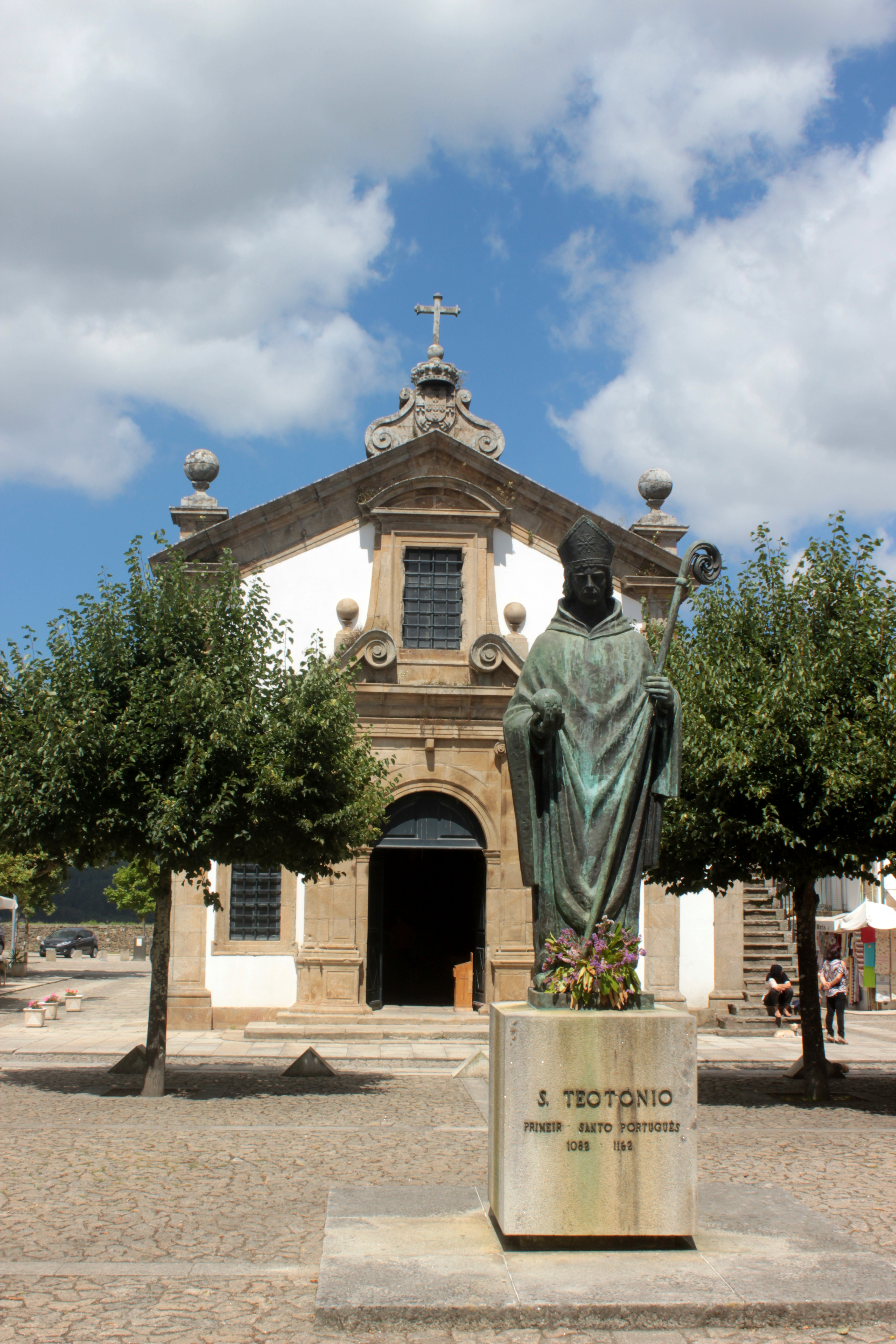 Valença do Minho